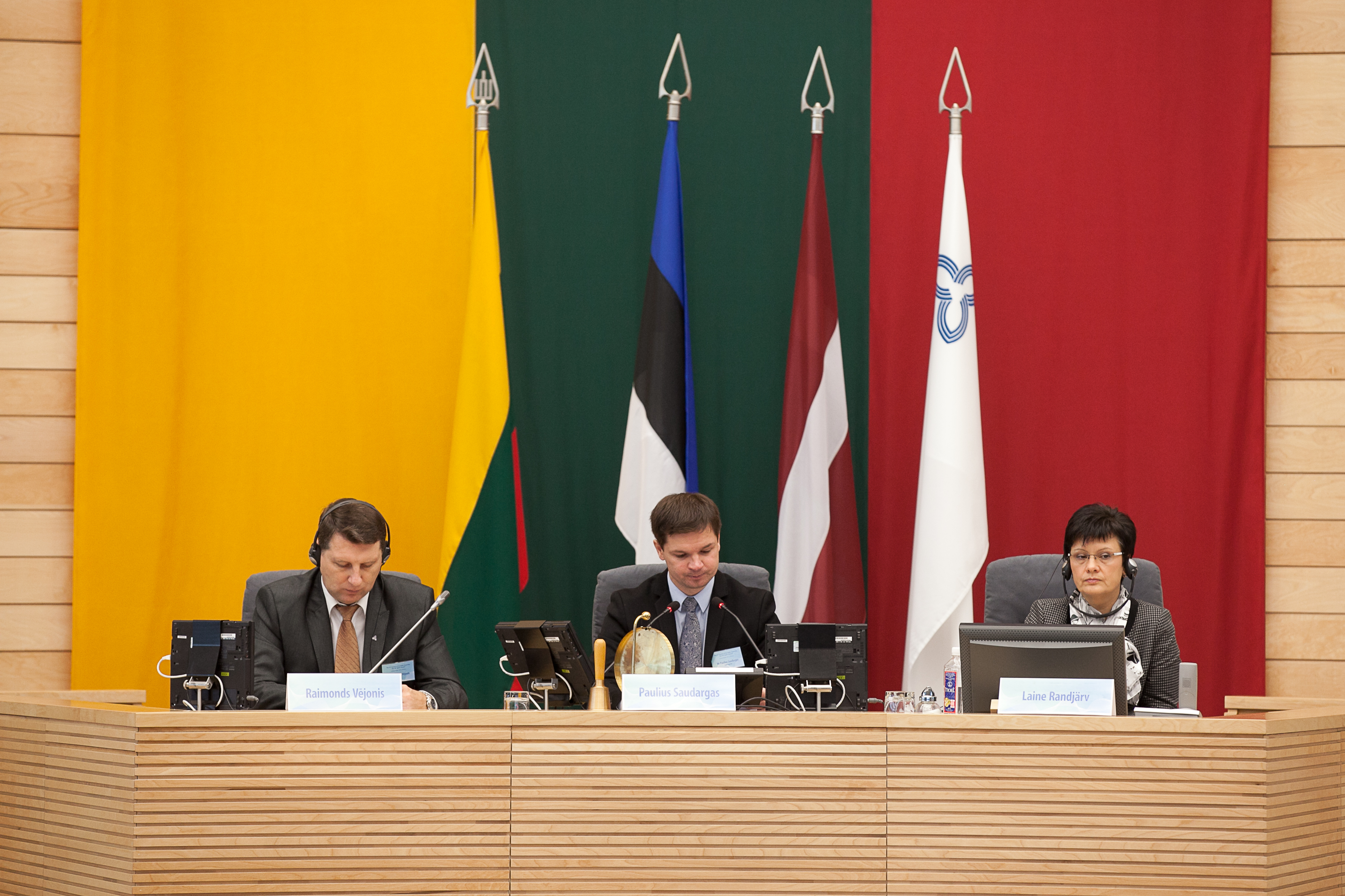 2012. gada 9. novembris. Saeimas deputāti piedalās Baltijas Asamblejas 31. sesijā, kas šogad notiek Lietuvas galvaspilsētā Viļņā. Foto: Ernests Dinka, Saeimas Kanceleja